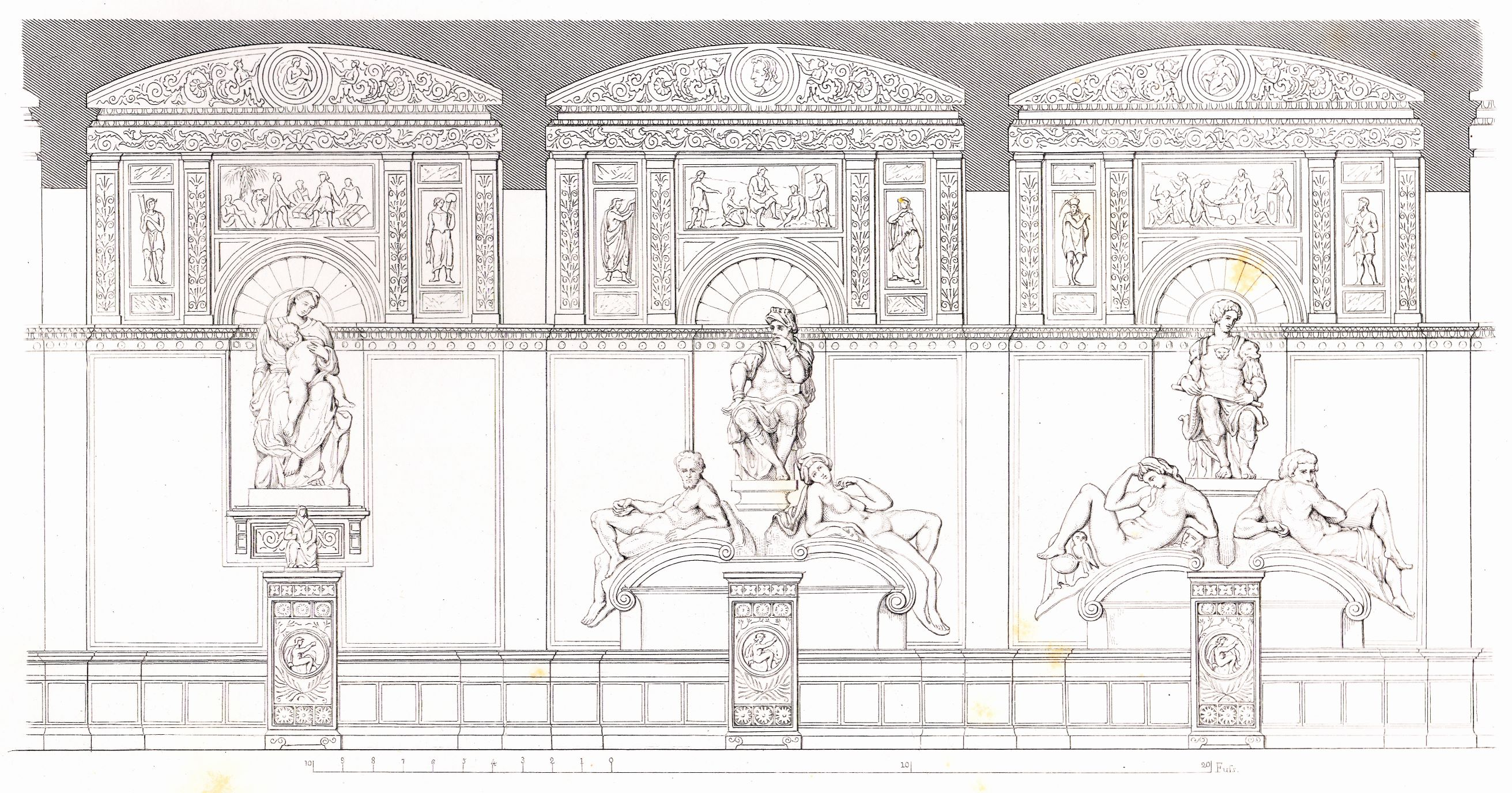 Berlin, Neues Museum: Wand Moderner Saal